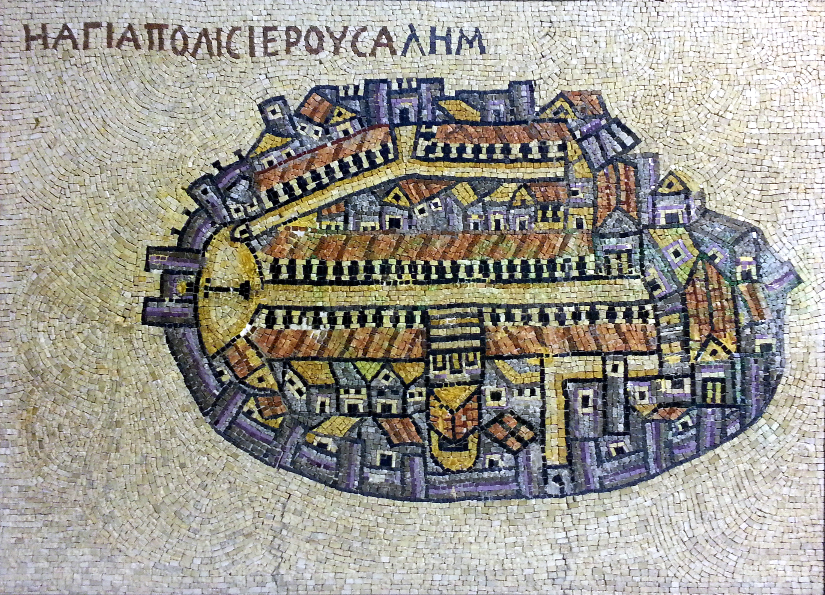 מראה בעיר העתיקה בירושלים